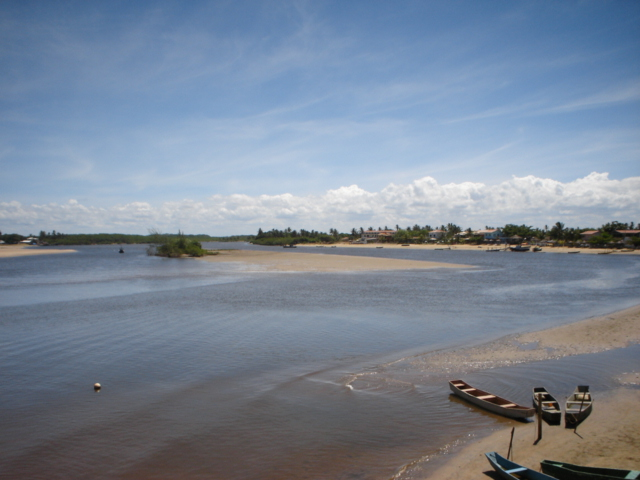 Cidade de São Mateus, Espírito Santo, Brasil.